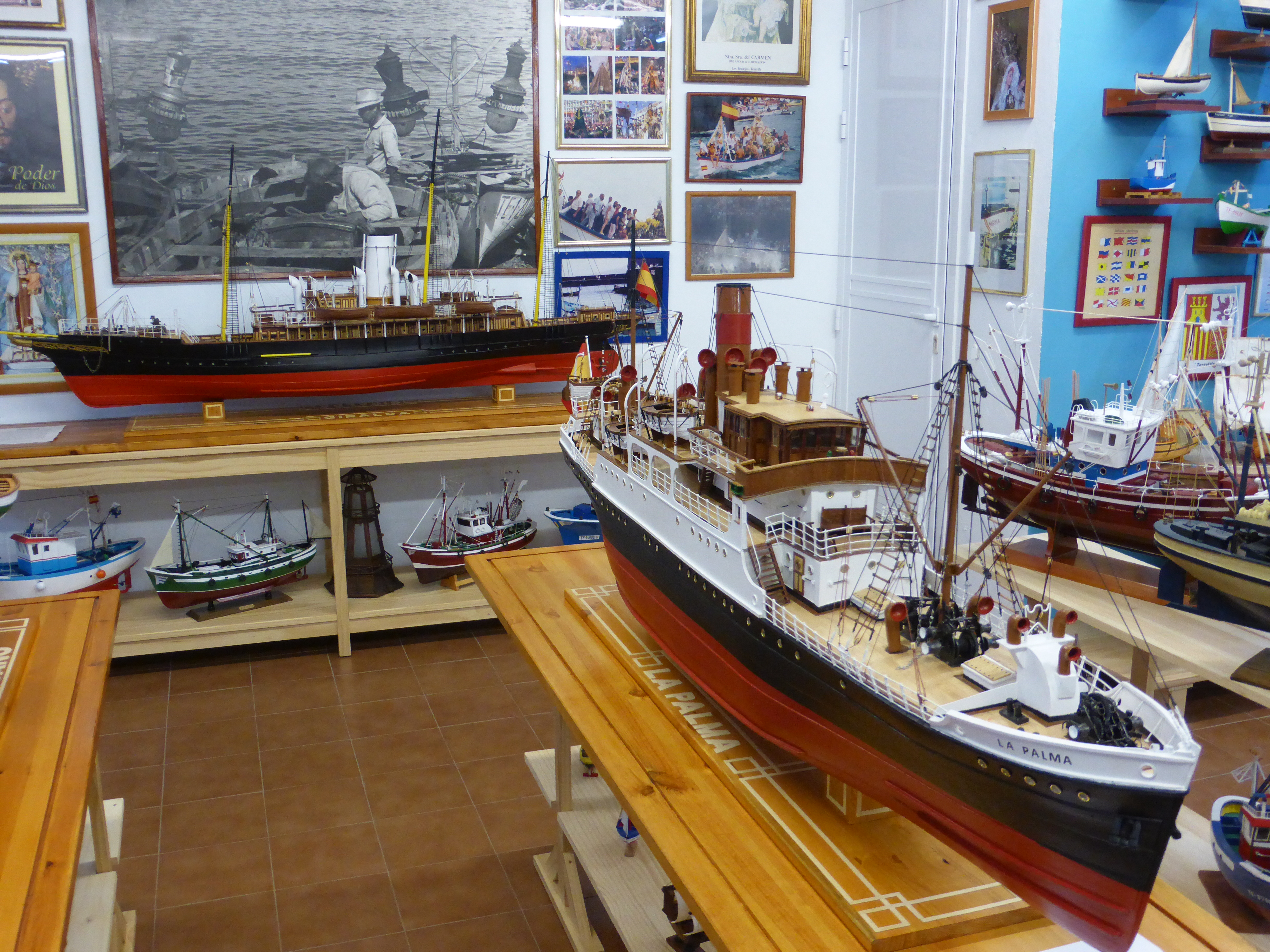 Cerca de la playa del Muelle, del municipio del Puerto de la Cruz, se encuentra el museo del Pescador, que contiene numerosas maquetas o modelos de barcos. A la derecha de la foto, se representa a escala el histórico vapor La Palma, del año 1912. El buque original se conserva atracado en el muelle Sur de Santa Cruz de Tenerife, la capital de la isla. La maqueta del correíllo La Palma ha sido realizada por el maquetista Enrique Acosta Galván, en 2017. El vapor La Palma navegó en servicios interinsulares canarios, hasta el año 1976. Era conocido como uno de los correíllos negros, de la compañía Trasmediterránea. Inicialmente (año 1912) perteneció a la compañía británica "Elder Dempster & Co", a través de su filial “Compañía de Vapores Correos Interinsulares Canarios”.